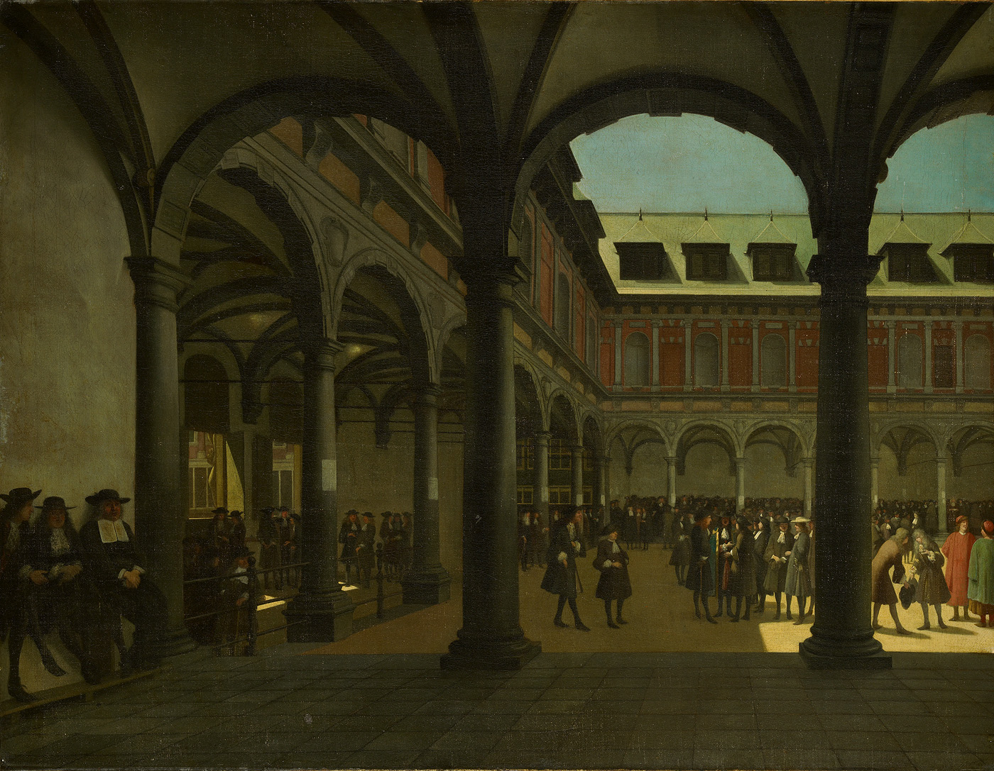 schilderij; gebouw; stadsgezicht Amsterdam; Beurs van De Keyser; Rokin